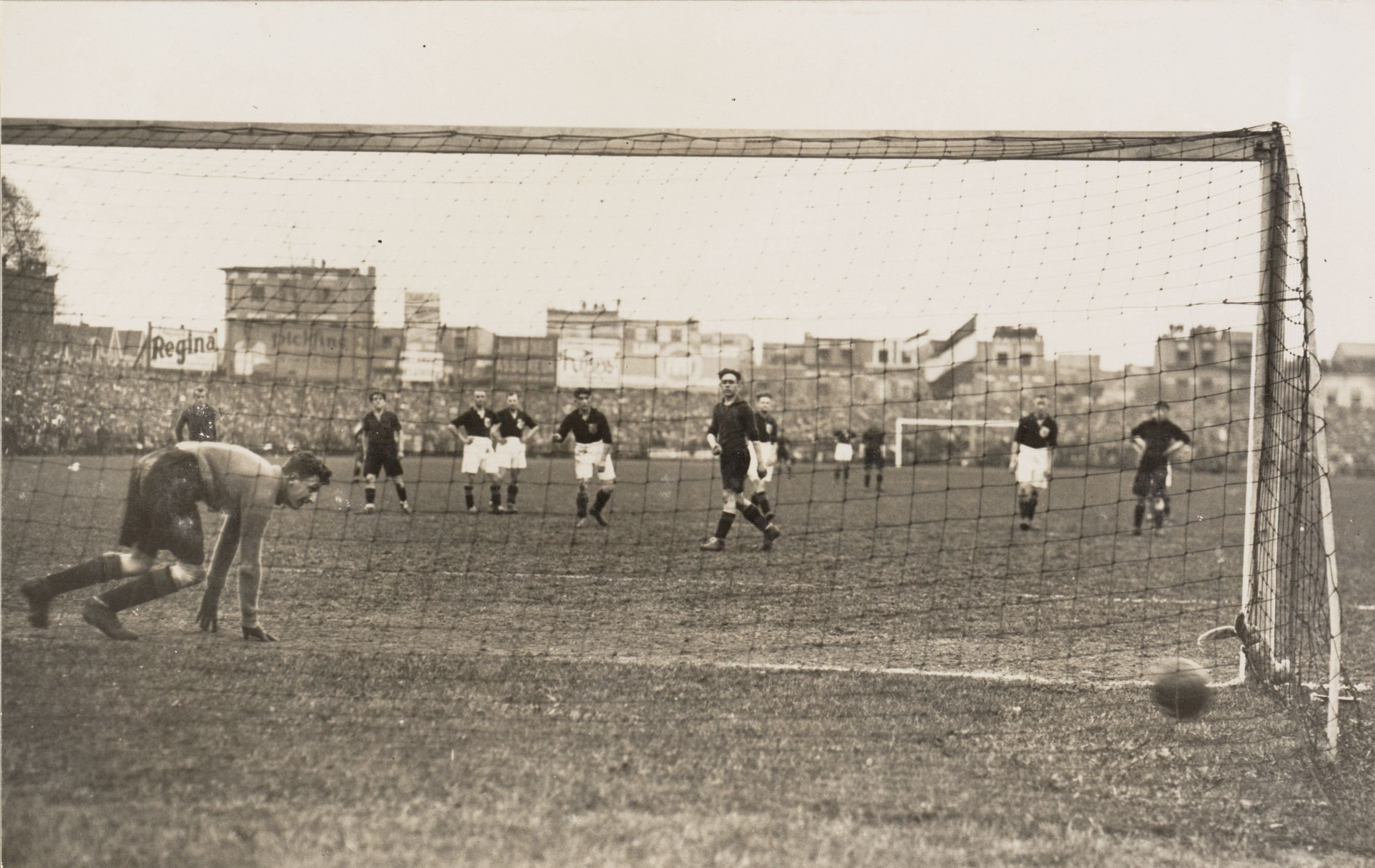 Raymond Braine scoort uit een strafschop het derde Belgische doelpunt. Doelman Gejus van der Meulen heeft geen kans. België - Nederland (3-1), gespeeld op 5 mei 1929 in het stadion van Beerschot (Het Kiel) te Antwerpen.